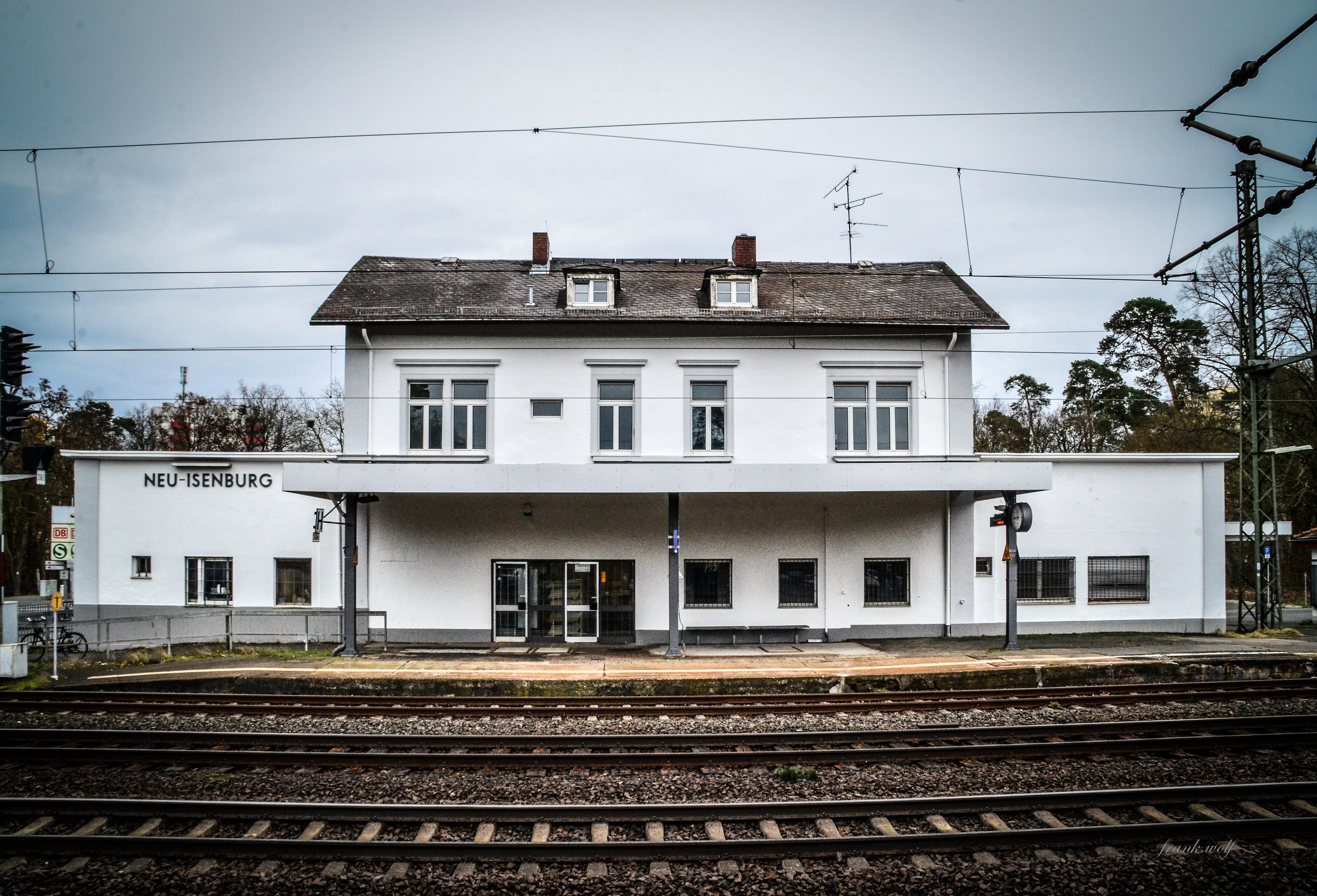 Hauptgebäude Bahnhof Neu-Isenburg von Gleis 2 aus betrachtet